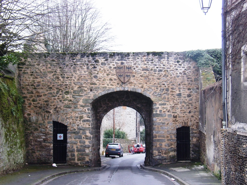 Porte Baudry, Fortifications de Montlhéry (Essonne, France). This building is indexed in the Base Mérimée, a database of architectural heritage maintained by the French Ministry of Culture, under the references PA00087972 and inscrit .